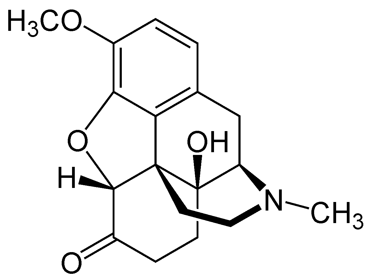 Oxycodone